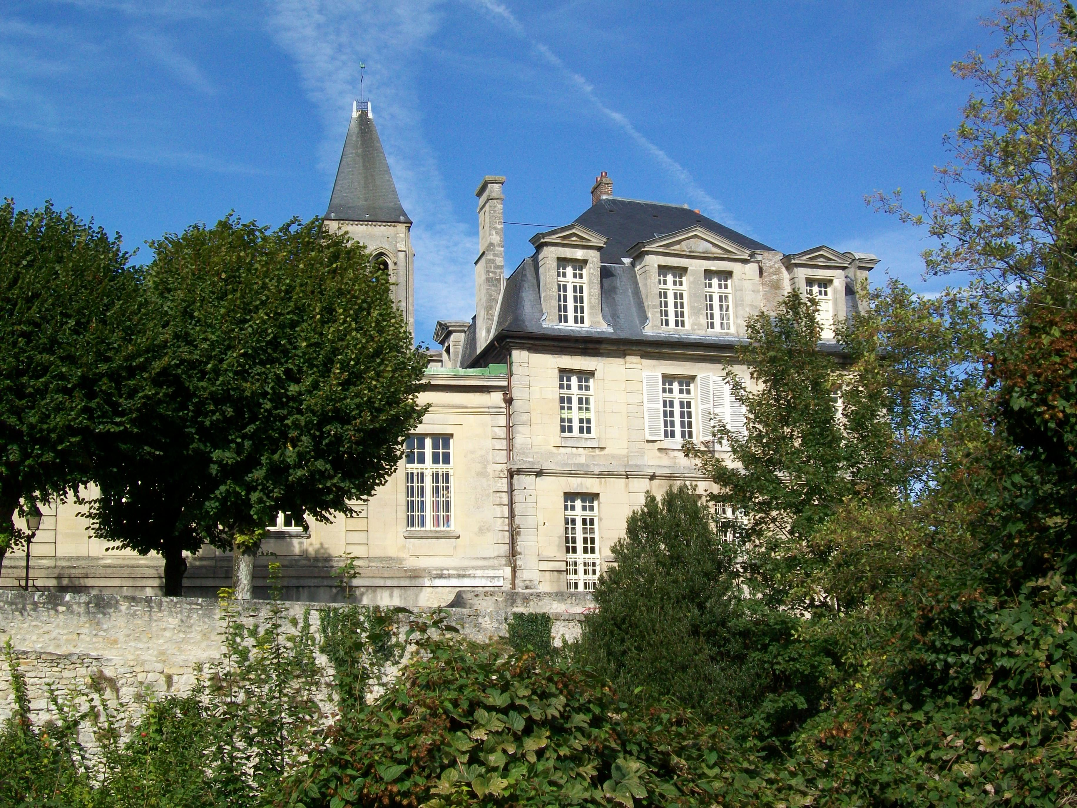 L'ancienne abbaye St-Vincent, avec les remparts sud au premier plan.